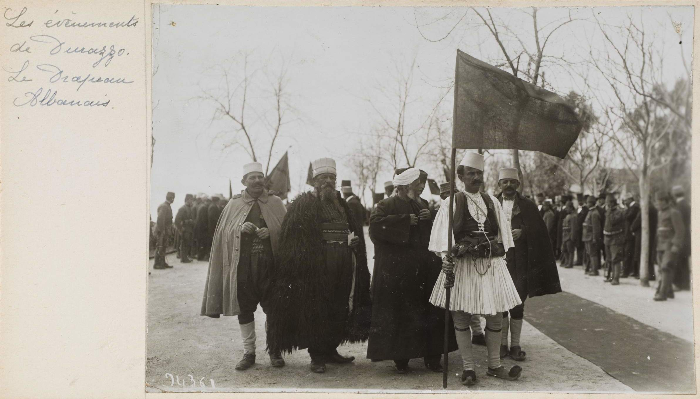 Les événements de Durazzo. Le drapeau albanais.